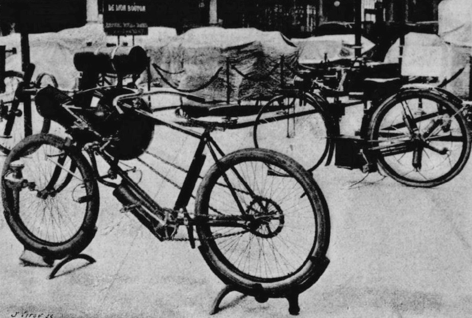 Bicyclettes à vapeur du nantais Briest (34, G) et du parisien Marc Létang (médecin, 33, D), au départ de Paris-Bordeaux-Paris 1895 - La Science Française, juin 1895, p.329